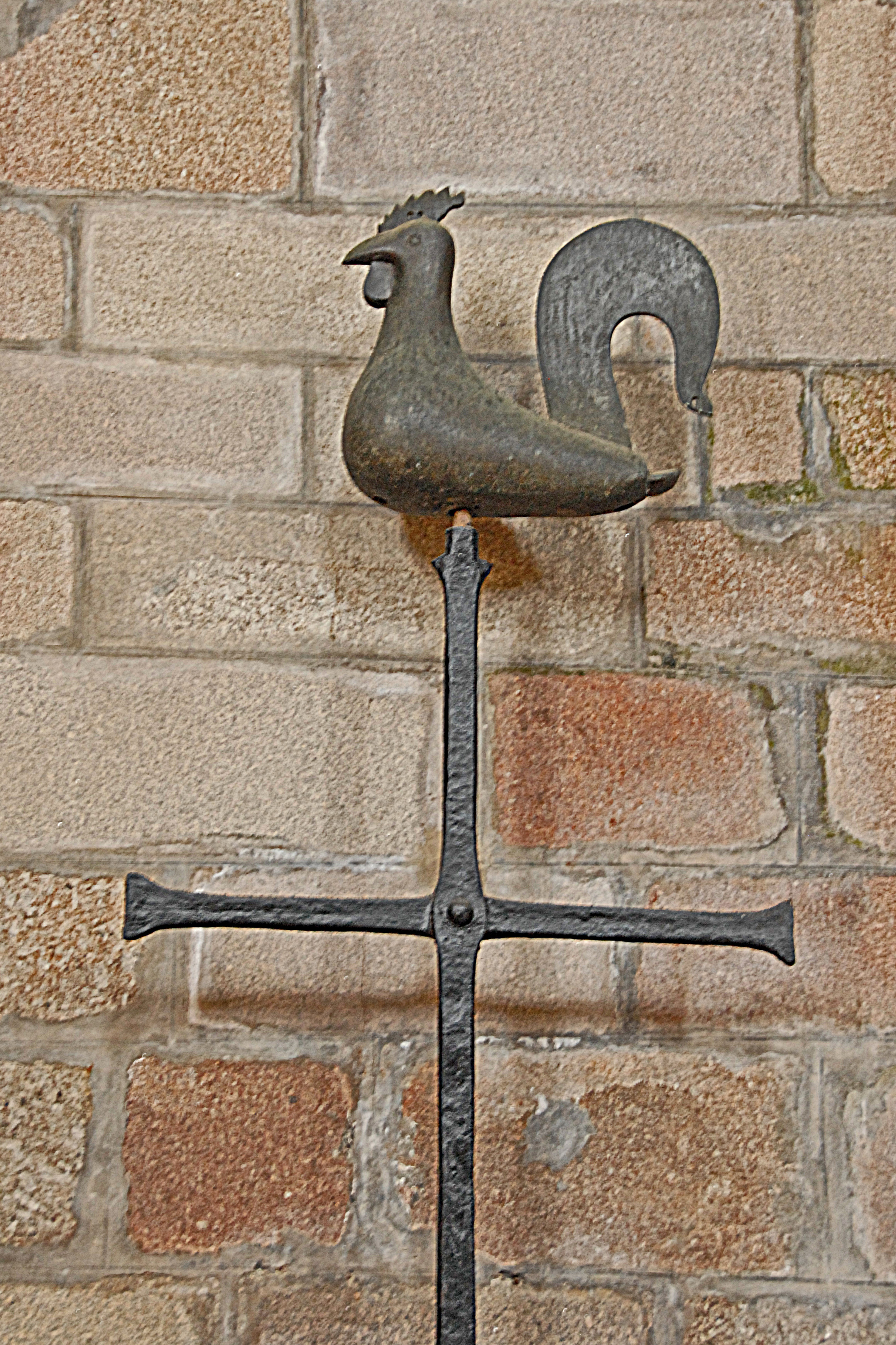 Stiftskirche St.-Léonard-de-Noblat, Turmhelmkreuz mit Wetterhahn